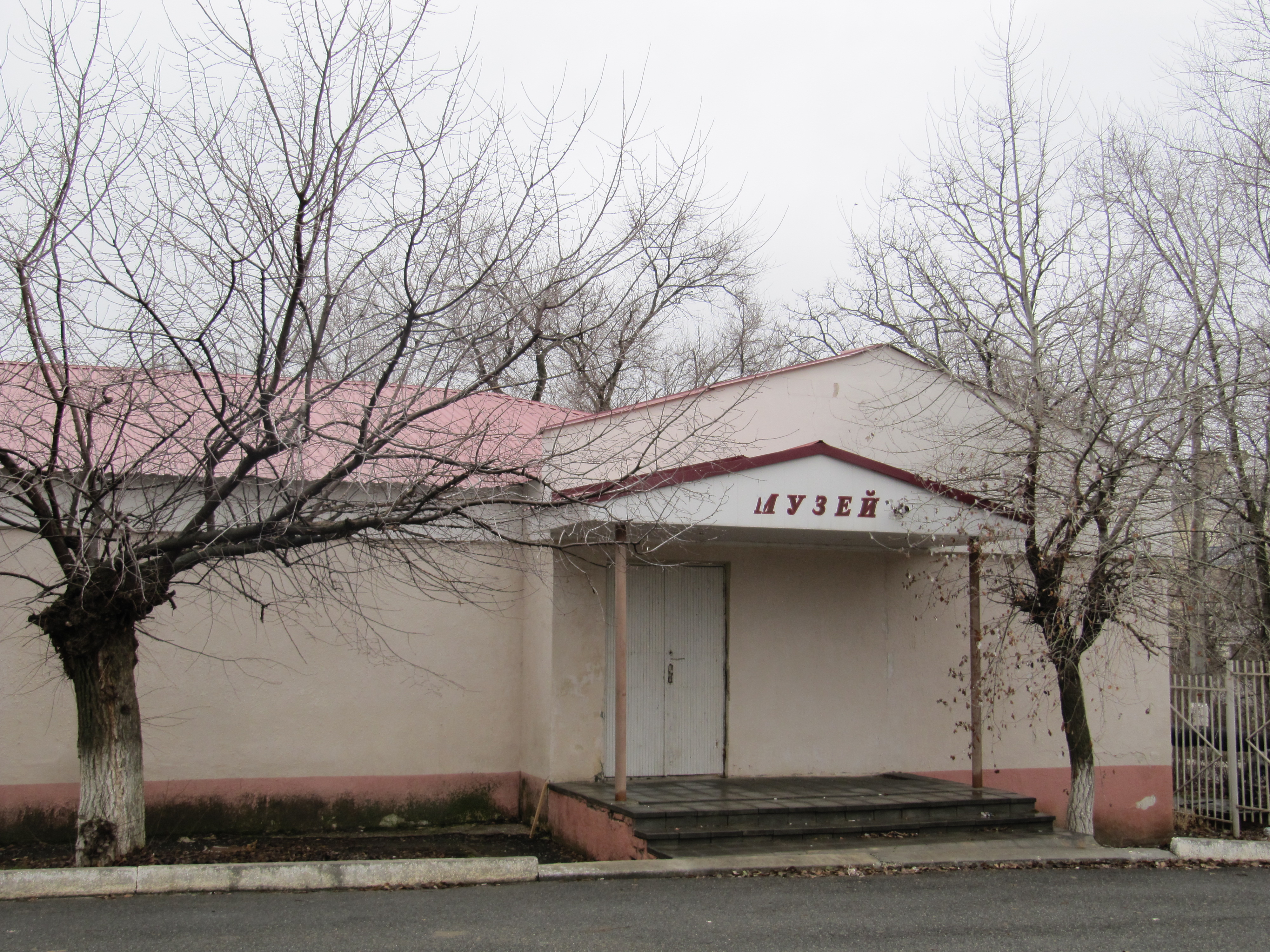 Бывшее здание Национального музея Калмыкии, Элиста, Калмыкия